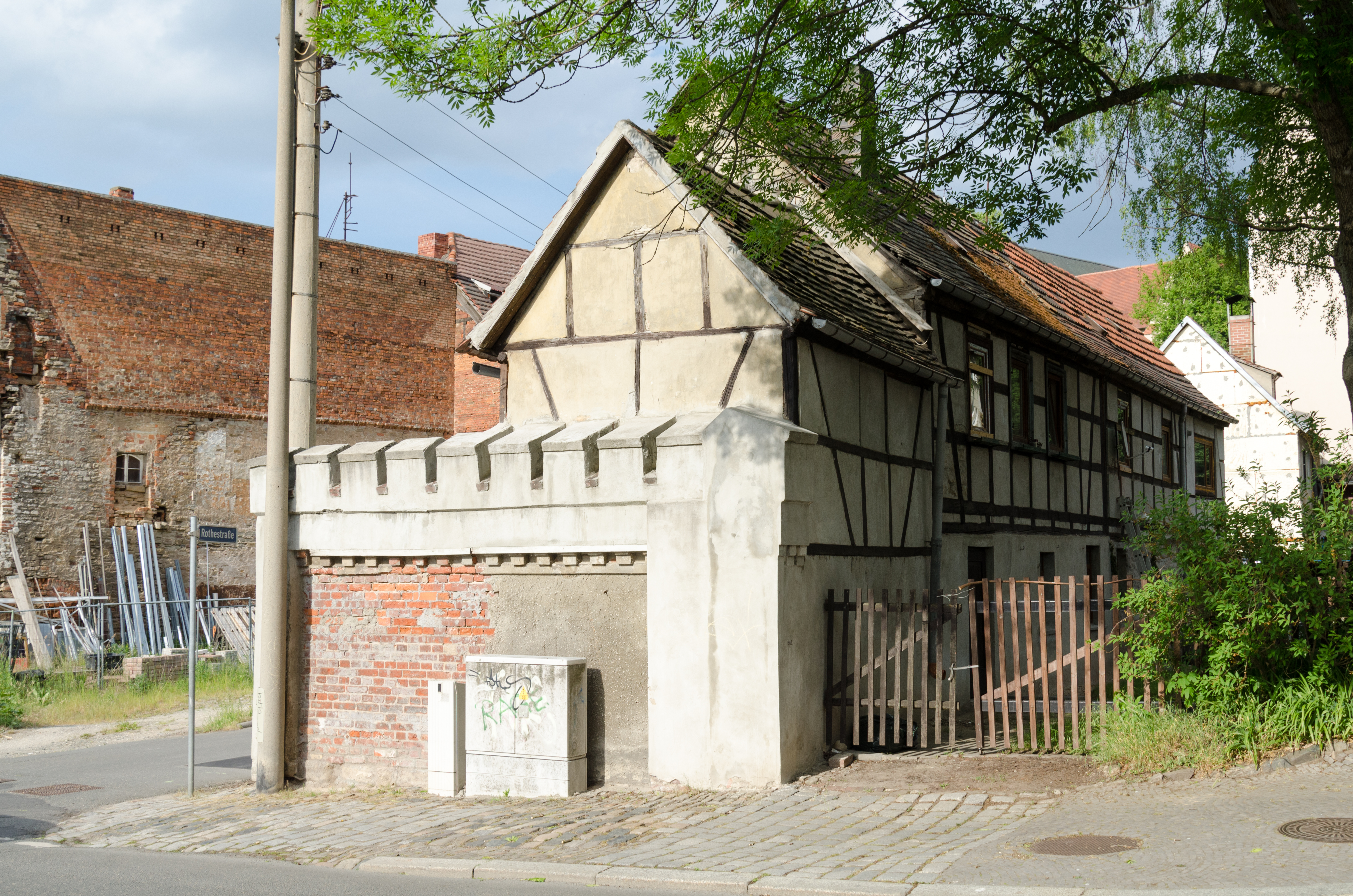 Zeitz, Rothestraße 24, 25